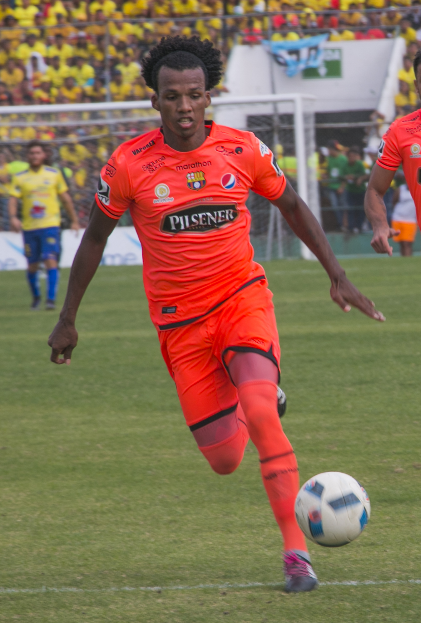 Dario Aimar jugando para Barcelona Sporting Club en el 2016